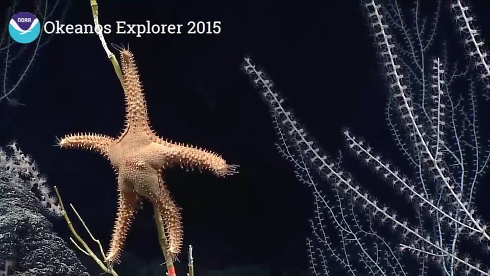 Une étoile de mer Circeaster arandae en train de se nourrir de corail, dans les abysses au large de Porto Rico.